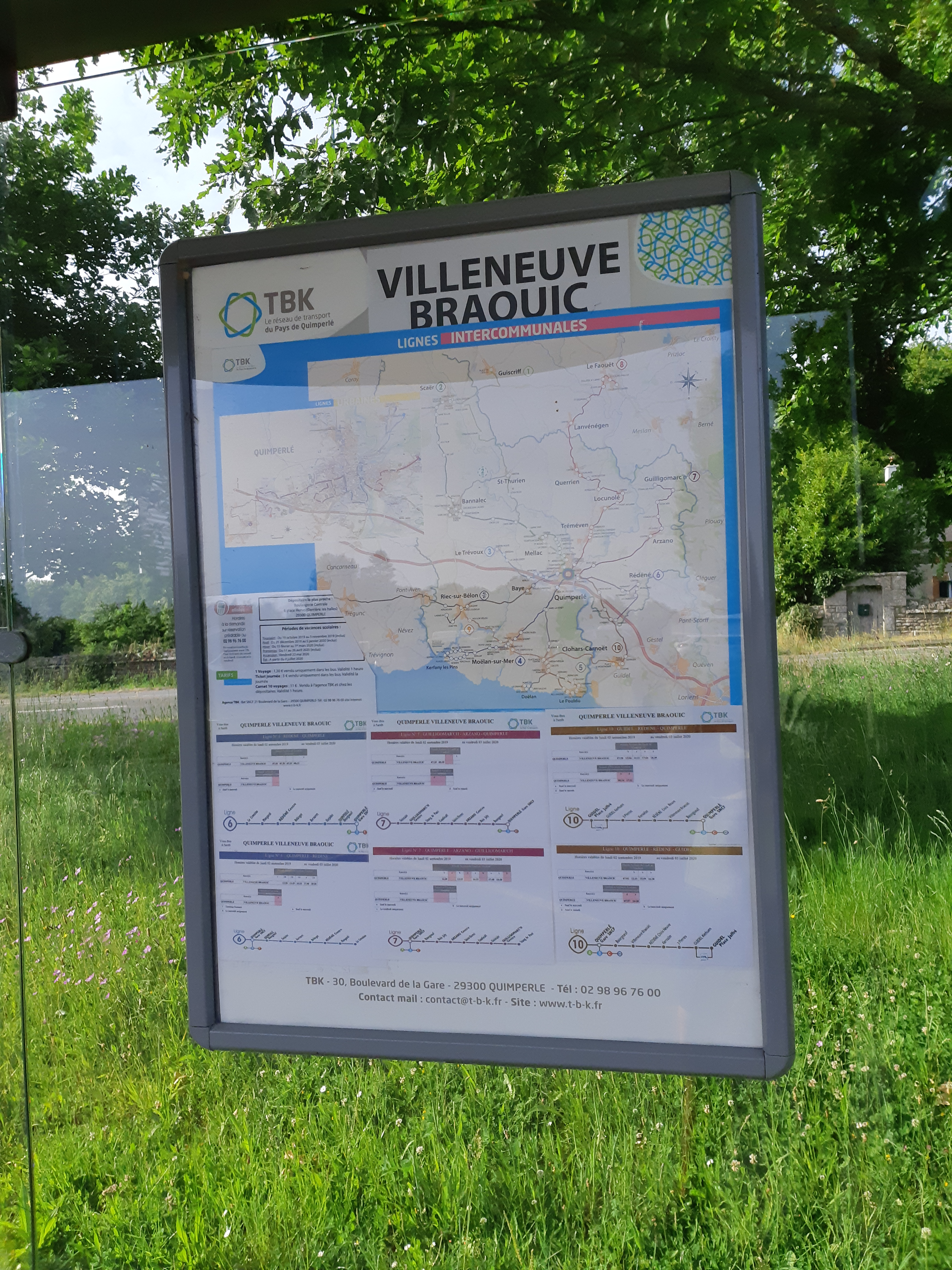 Panneau horaires intercommunale TBK à l'arrêt Villeneuve Braouic